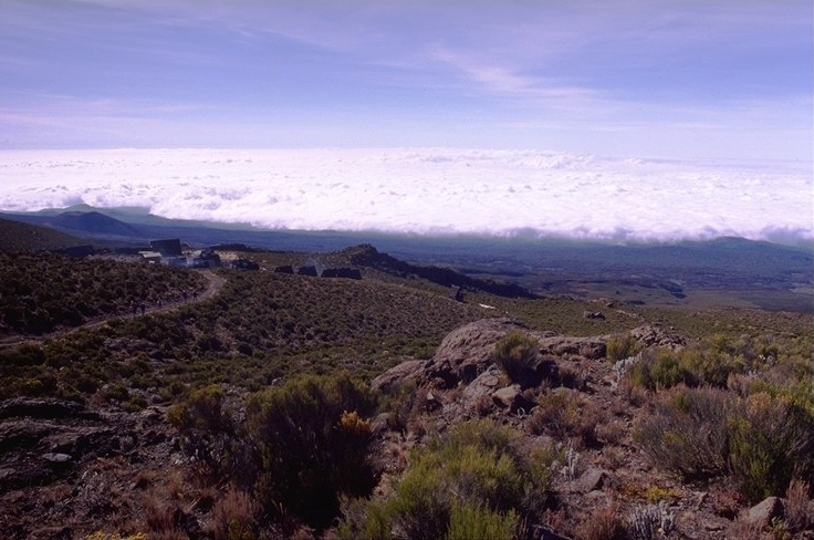 Kilimanjaro National Park - Tanzania